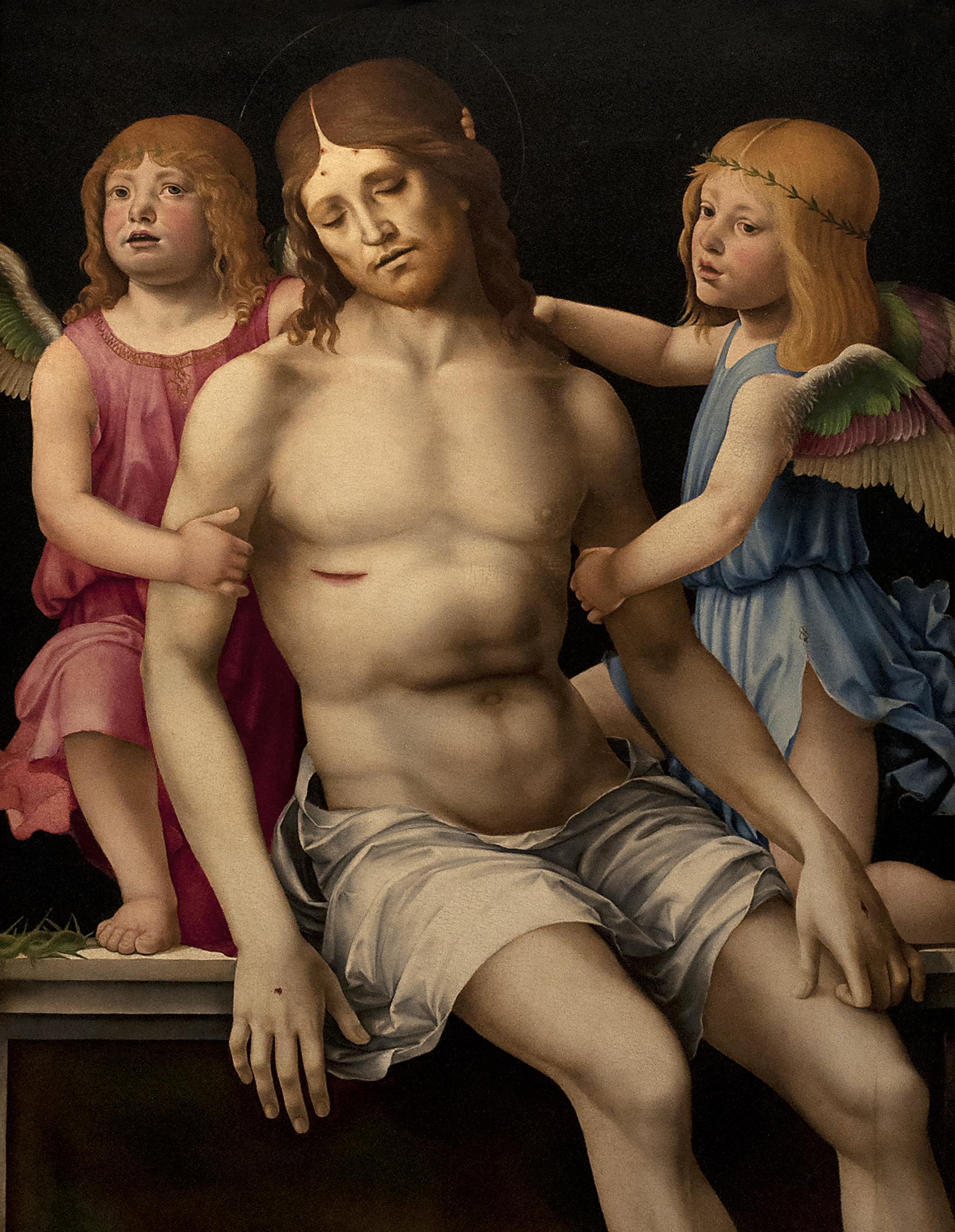 Francesco Raibolini (1447-1517) - Piëta met twee engelen (1490) - Bologna Pinacoteca Nazionale